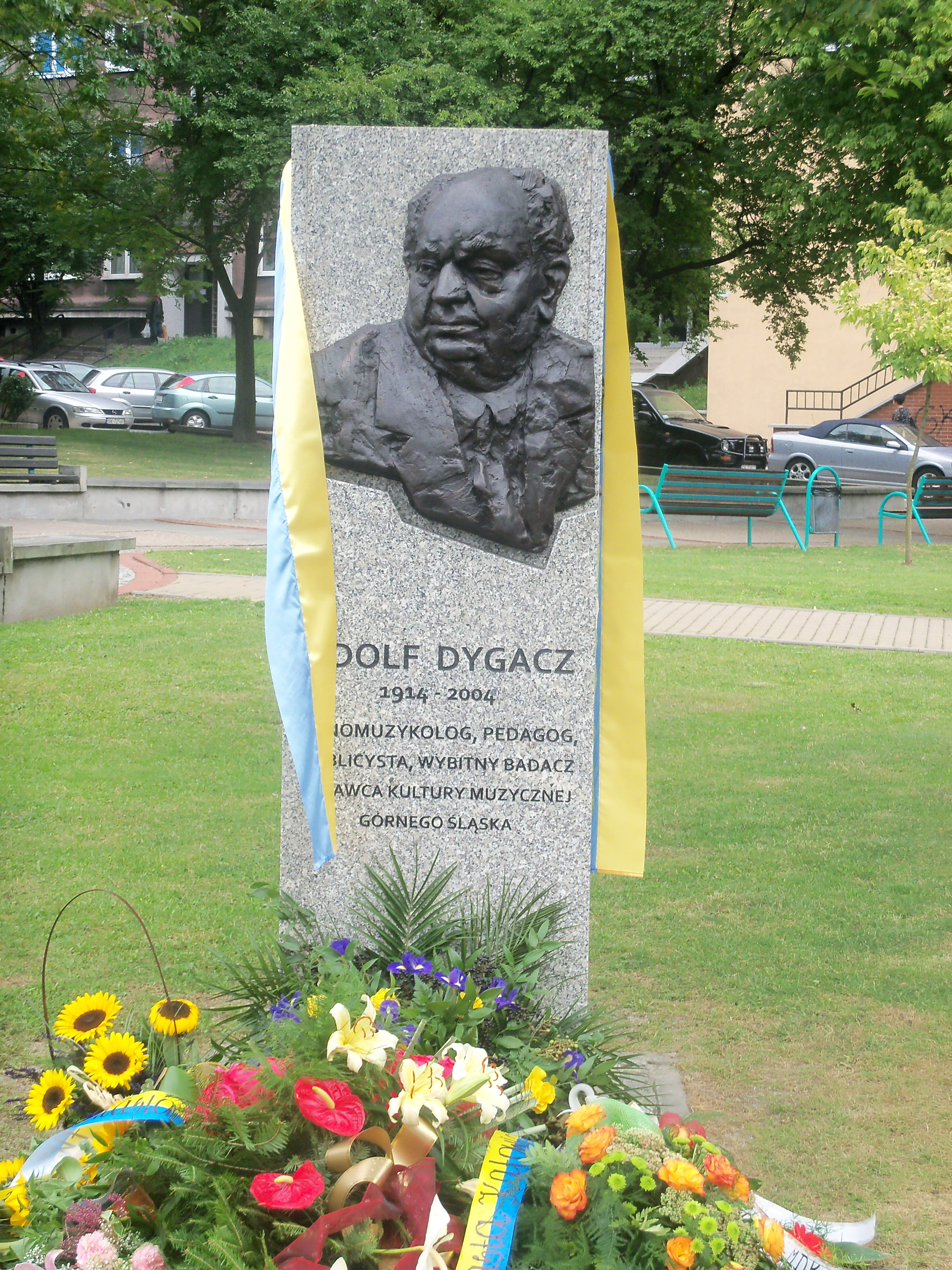 Tablica upamiętniająca Adolfa Dygacza na pl. Grunwaldzkim w Katowicach